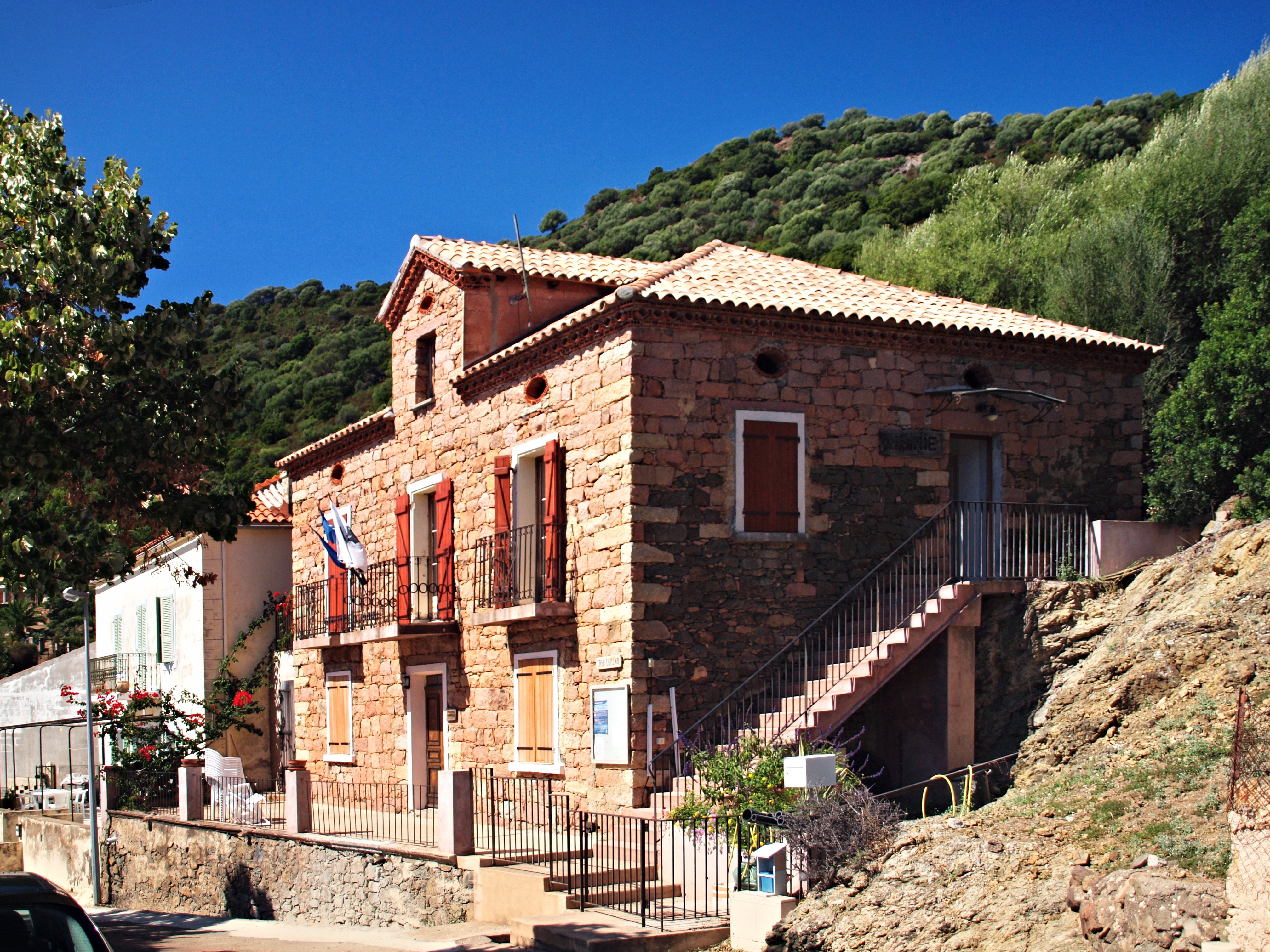 Osani (Corsica) - Mairie (Casa cumuna)